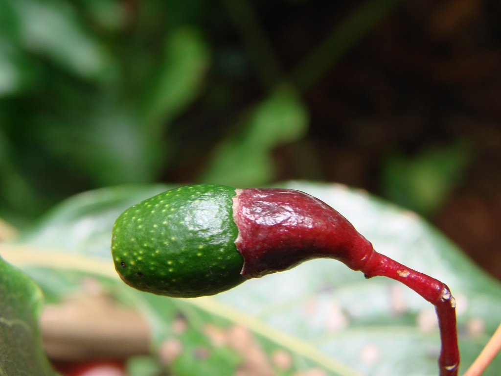 Nectandra cissiflora Nees (Sin. het. Nectandra myriantha Meisn.) - LAURACEAE - ARIE da Granja do Ipê - Brasília - Distrito Federal - Brasil.